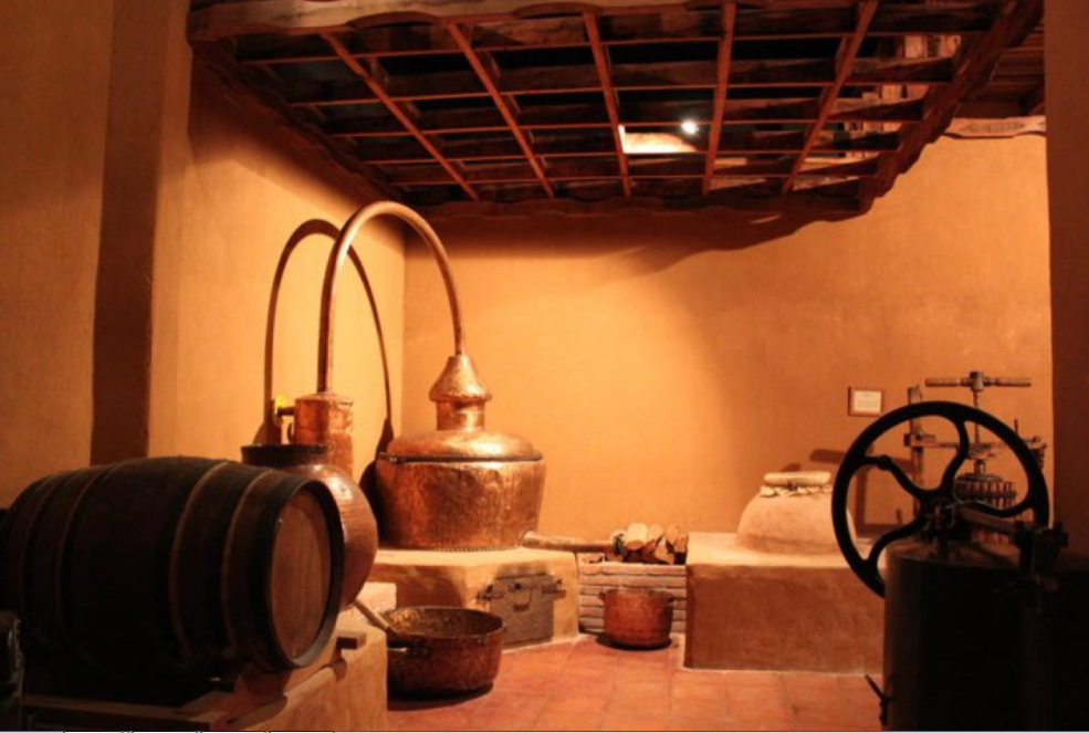 Fotografía tomada museo del pisco Capel Vicuña Chile